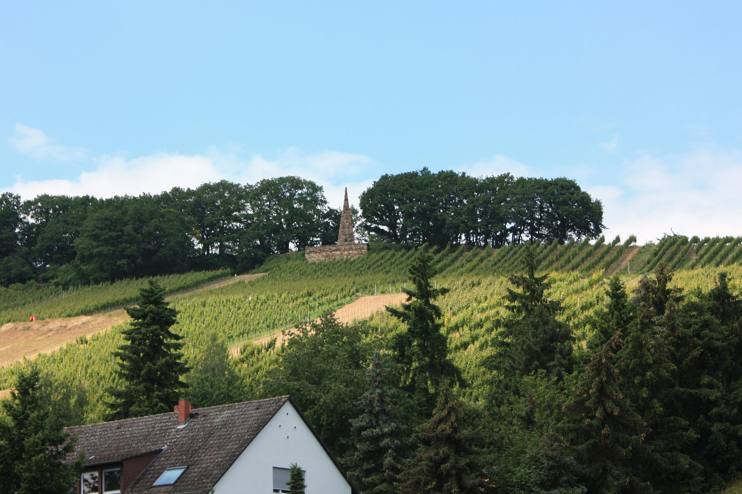 Goethestein bei Wiesbaden Frauenstein, Hessen, Deutschland